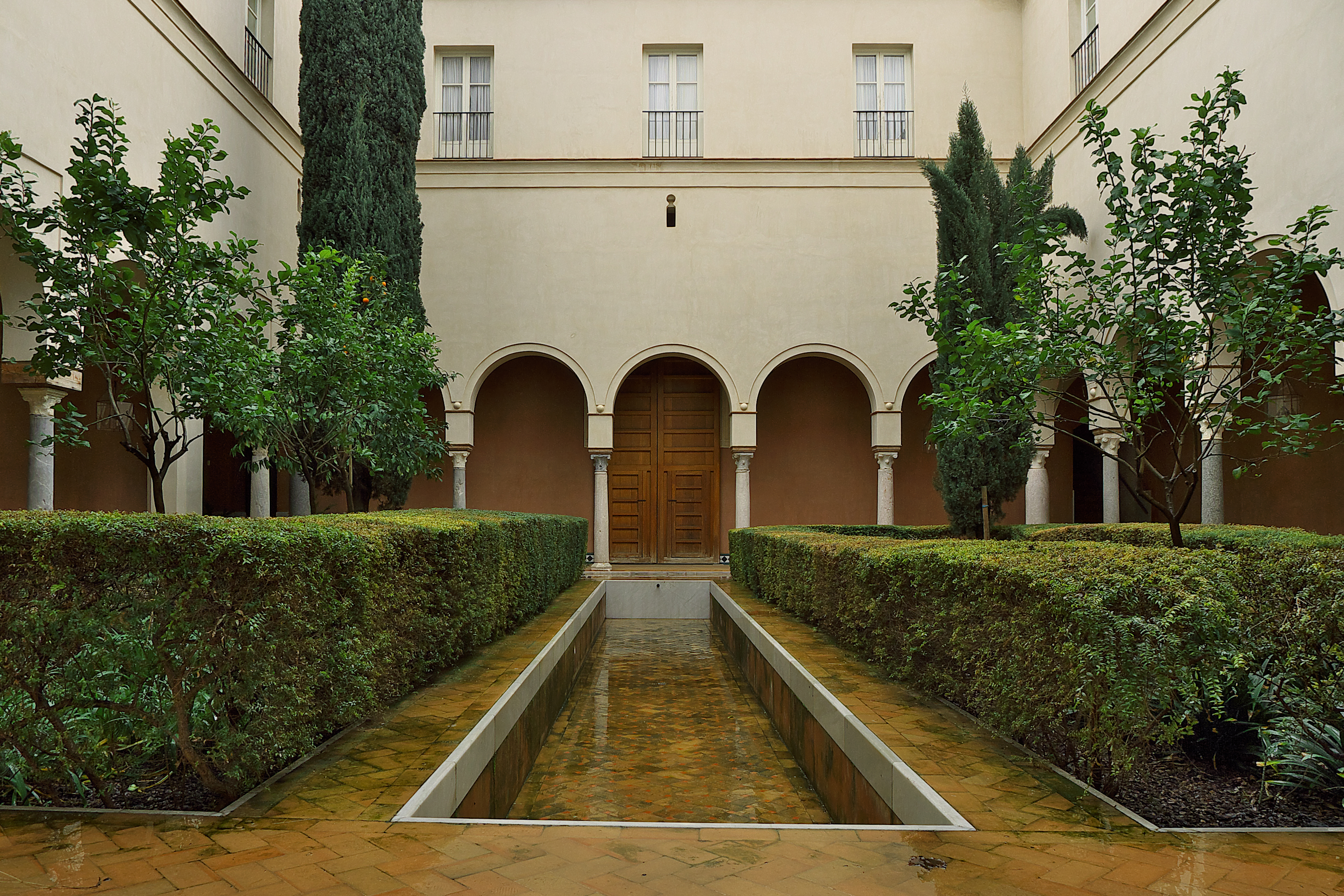 Diego López de Estúñiga (1350-1417), justicia mayor de Castilla, edifica su residencia en Sevilla, ocupando casas de la judería (1391). Proyecta un edificio con planta referenciada al Palacio mudéjar o de Pedro I en los Reales Alcázares de Sevilla. La Casa de Guzmán, Sotomayor, la Casa de Enríquez, Dávila y la Casa de Altamira, también ocuparán el palacio.